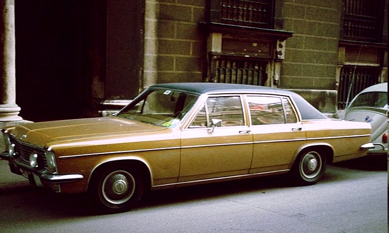 Opel Diplomat B in Wien